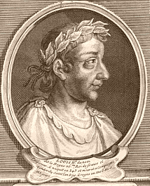 Louis II de France, Louis the Stammerer